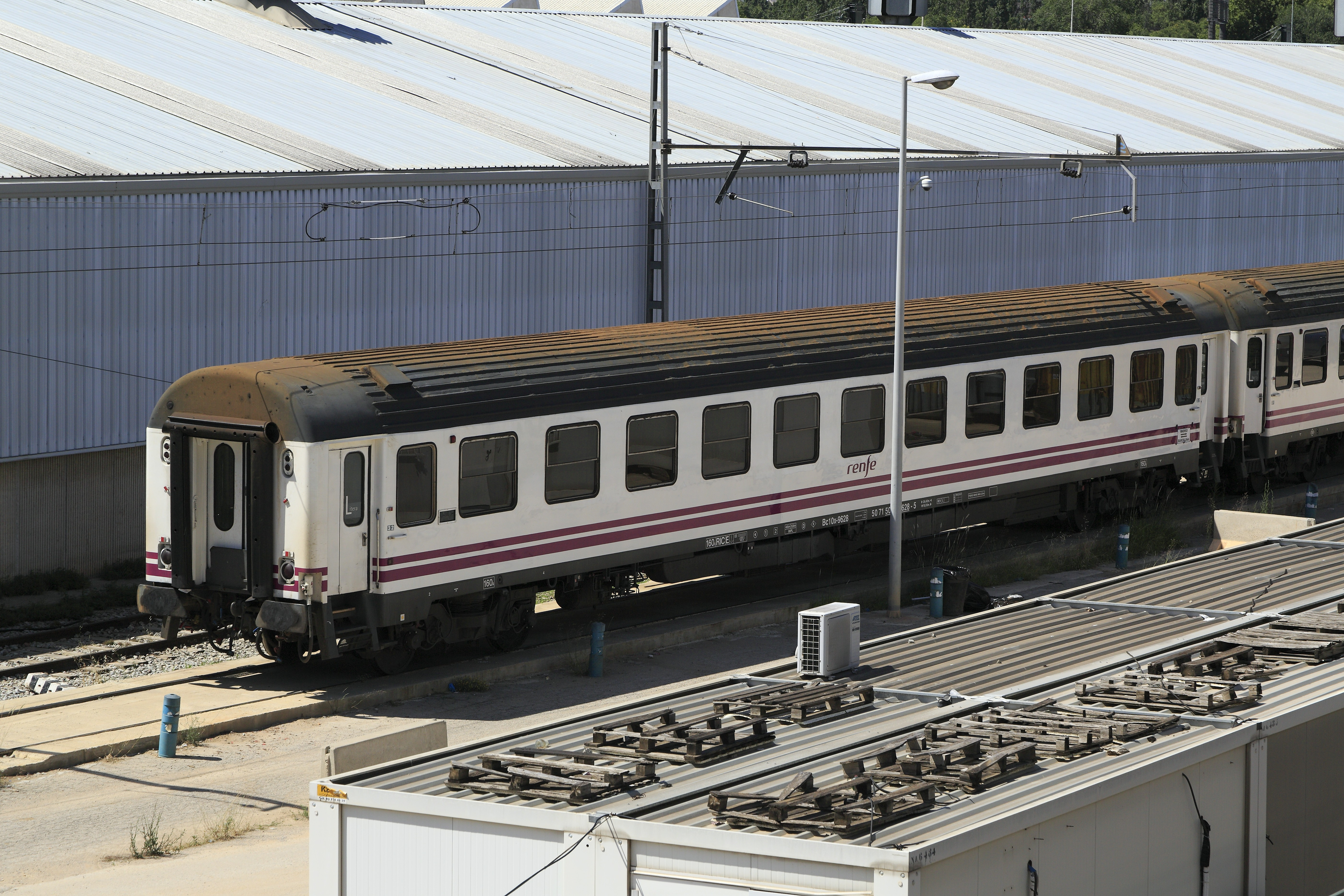 Liegewagen, Corail-Nachbau von CAF. Ein äußerlich sichtbarer Unterschied zu den Wagen der SNCF sind die zusätzlichen hochliegenden Schlusslampen für das in Spanien lange vorgeschriebene Dreilichtschlusssignal.